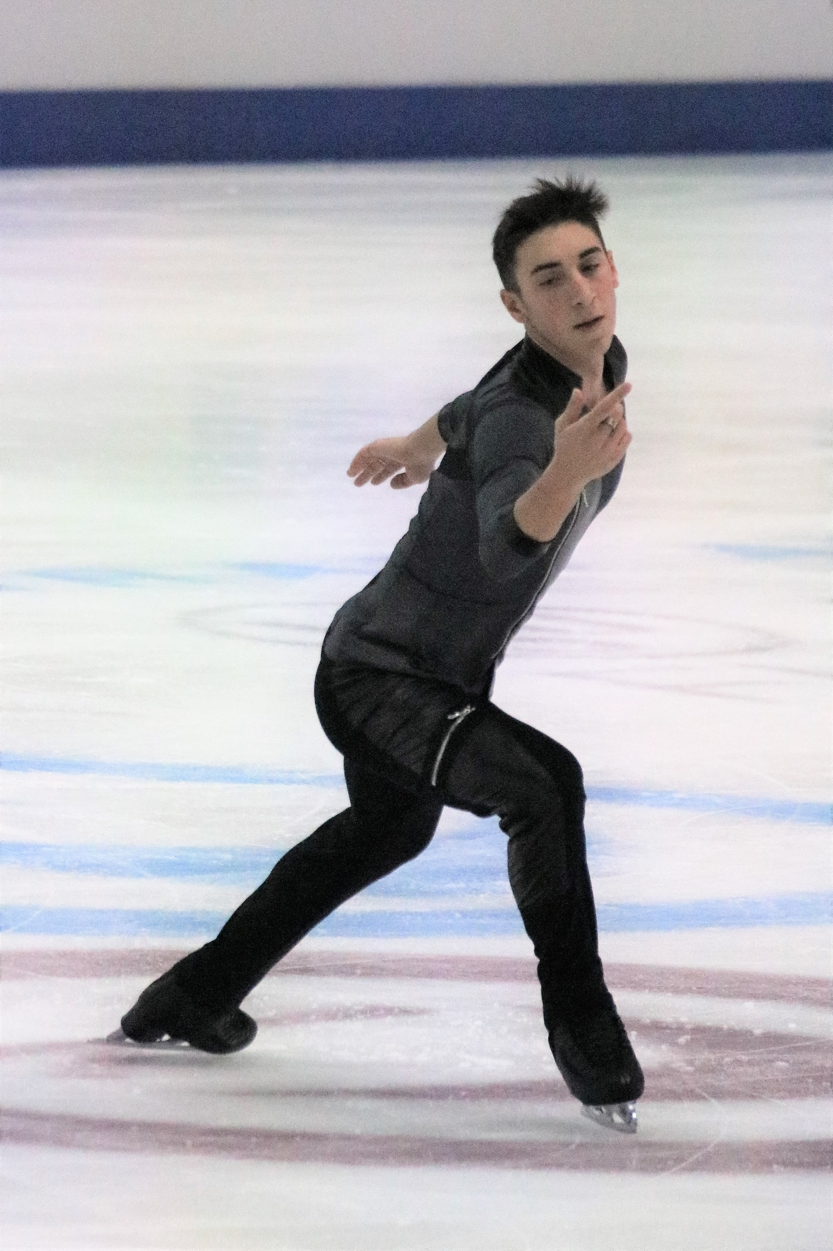 Габриэле Фраджипани (Италия) на чемпионате Европы по фигурному катанию 2020